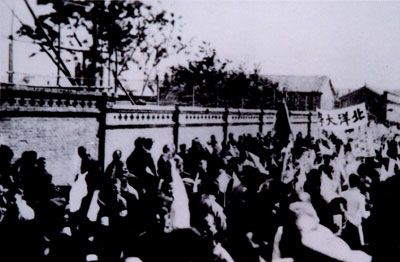 天津学生支援五四